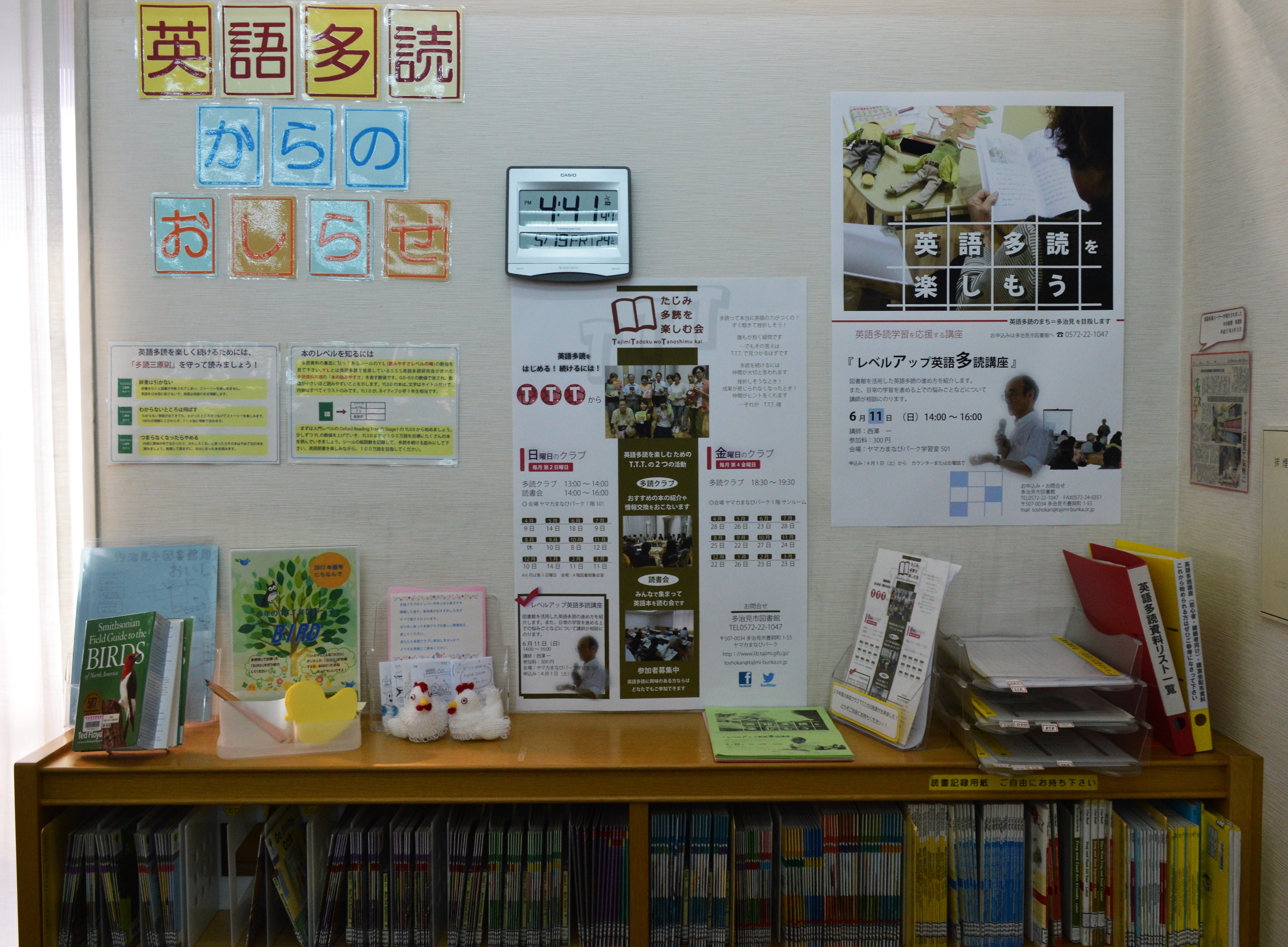 多治見市図書館。3階の英語多読コーナー。